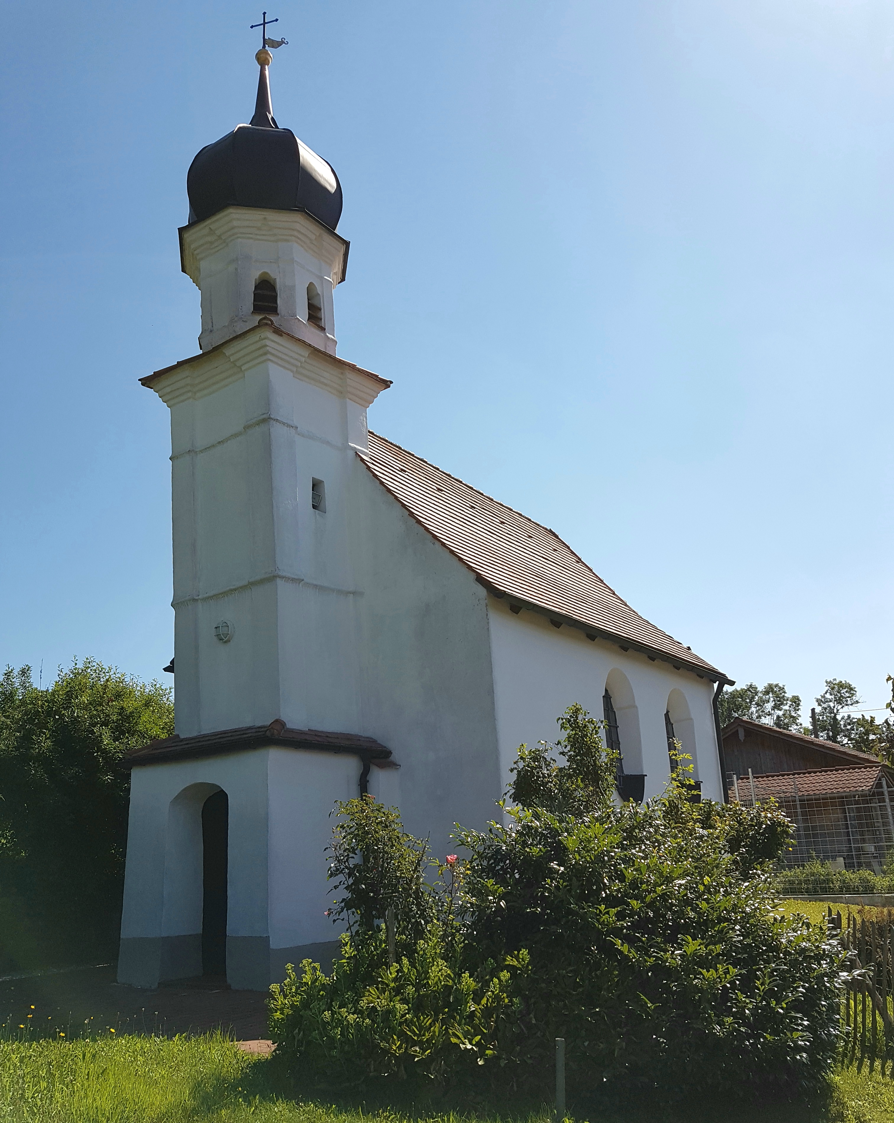 Kapelle